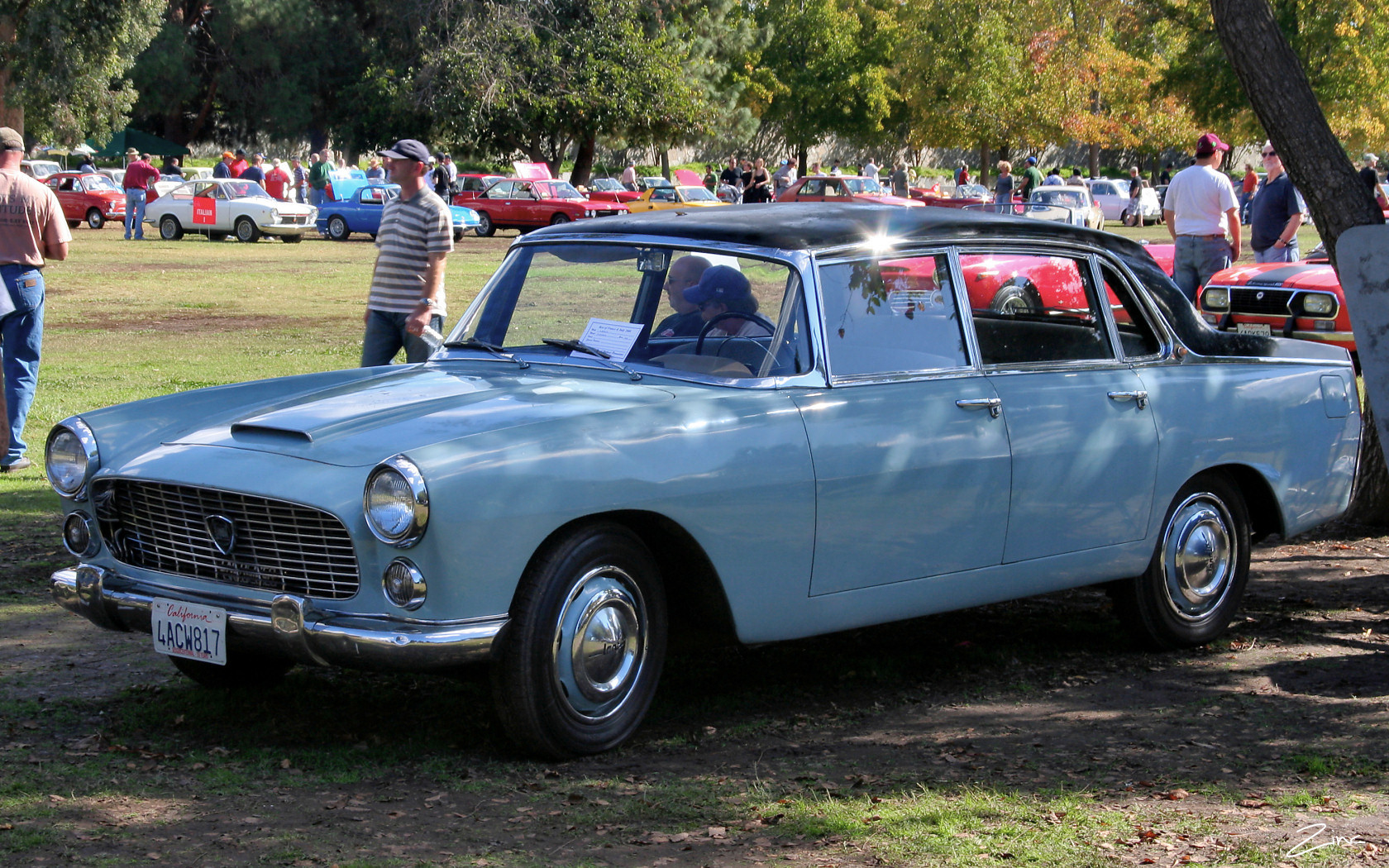 1966 Lancia Flaminia Berlina